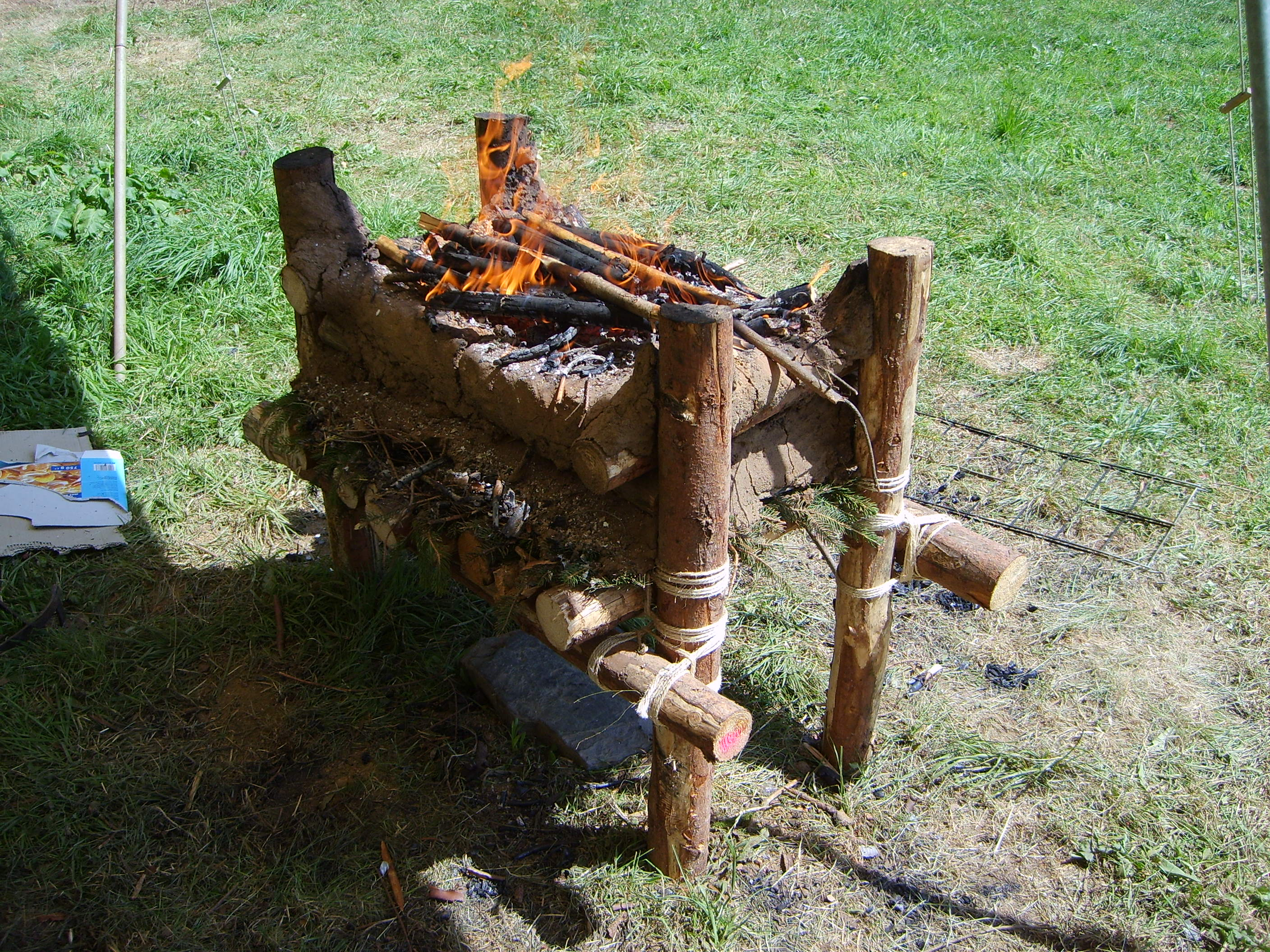 Table à feu (scoutisme)